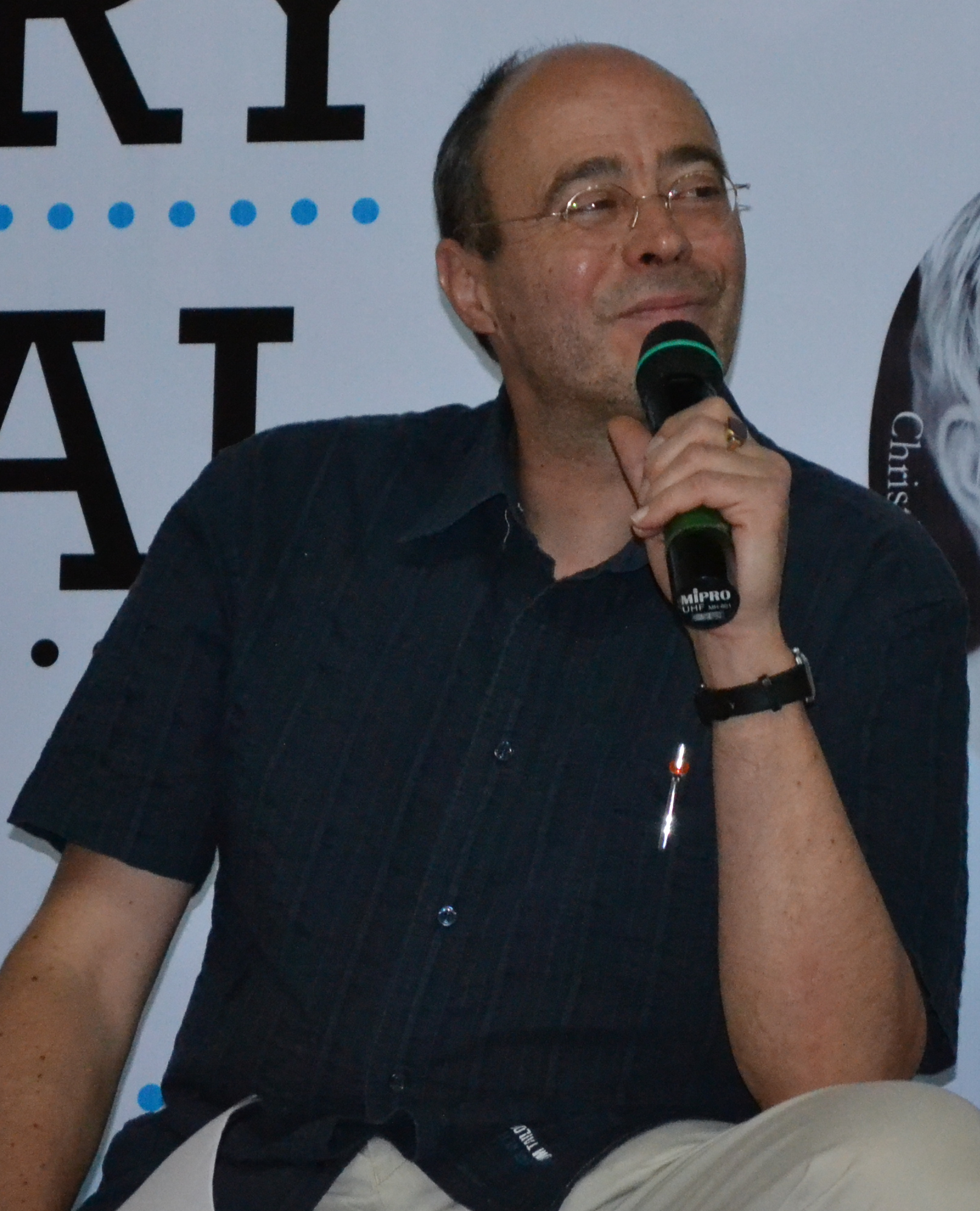 Schriftsteller Michael Kleeberg